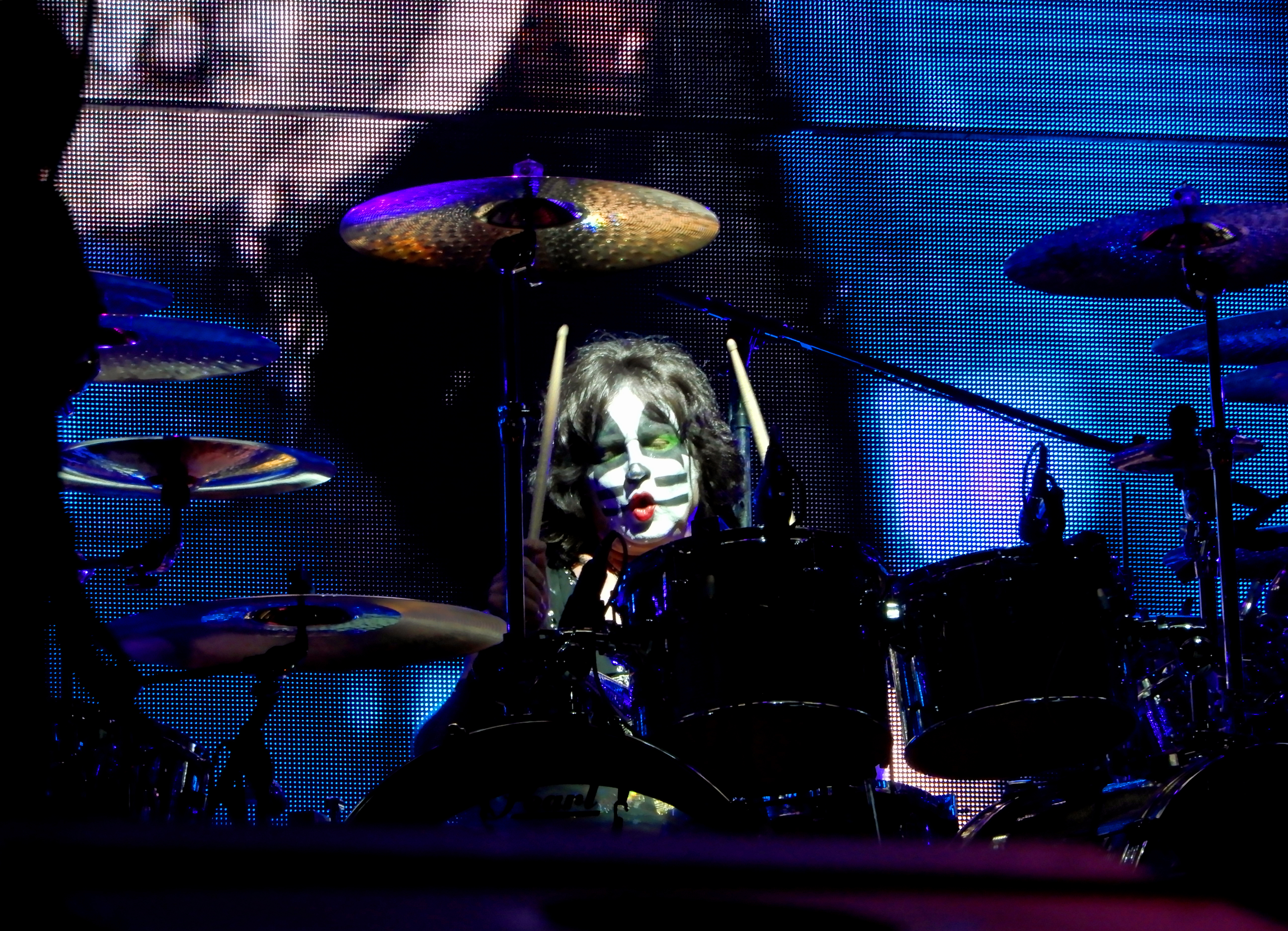 Eric Singer au Hellfest 2019